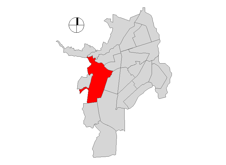 Comuna 19 de Santiago de Cali, Colombia.